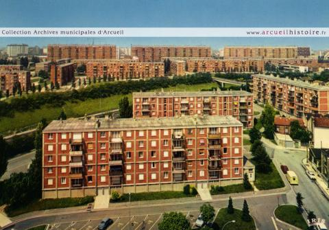 Cité du Chaperon-Vert à sa contruction